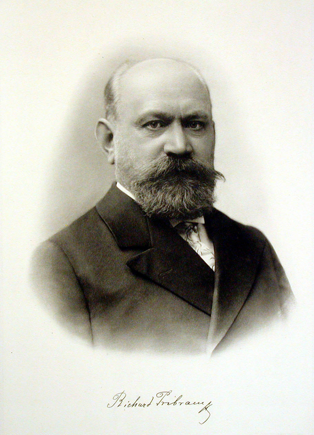 Bild von Richard Pribram (1847-1928)